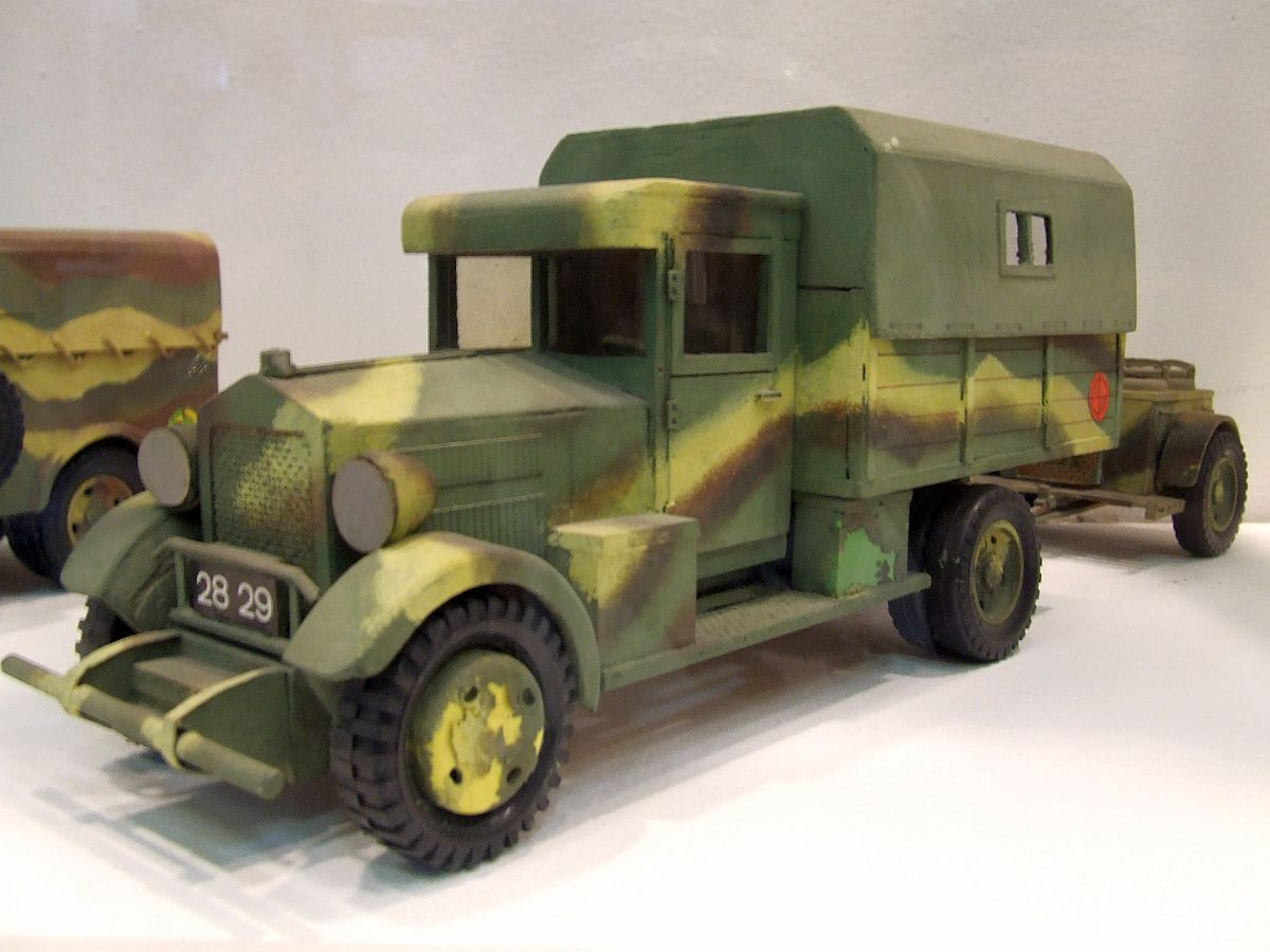 Fiat 621 L, Muzeum Techniki, Warszawa.